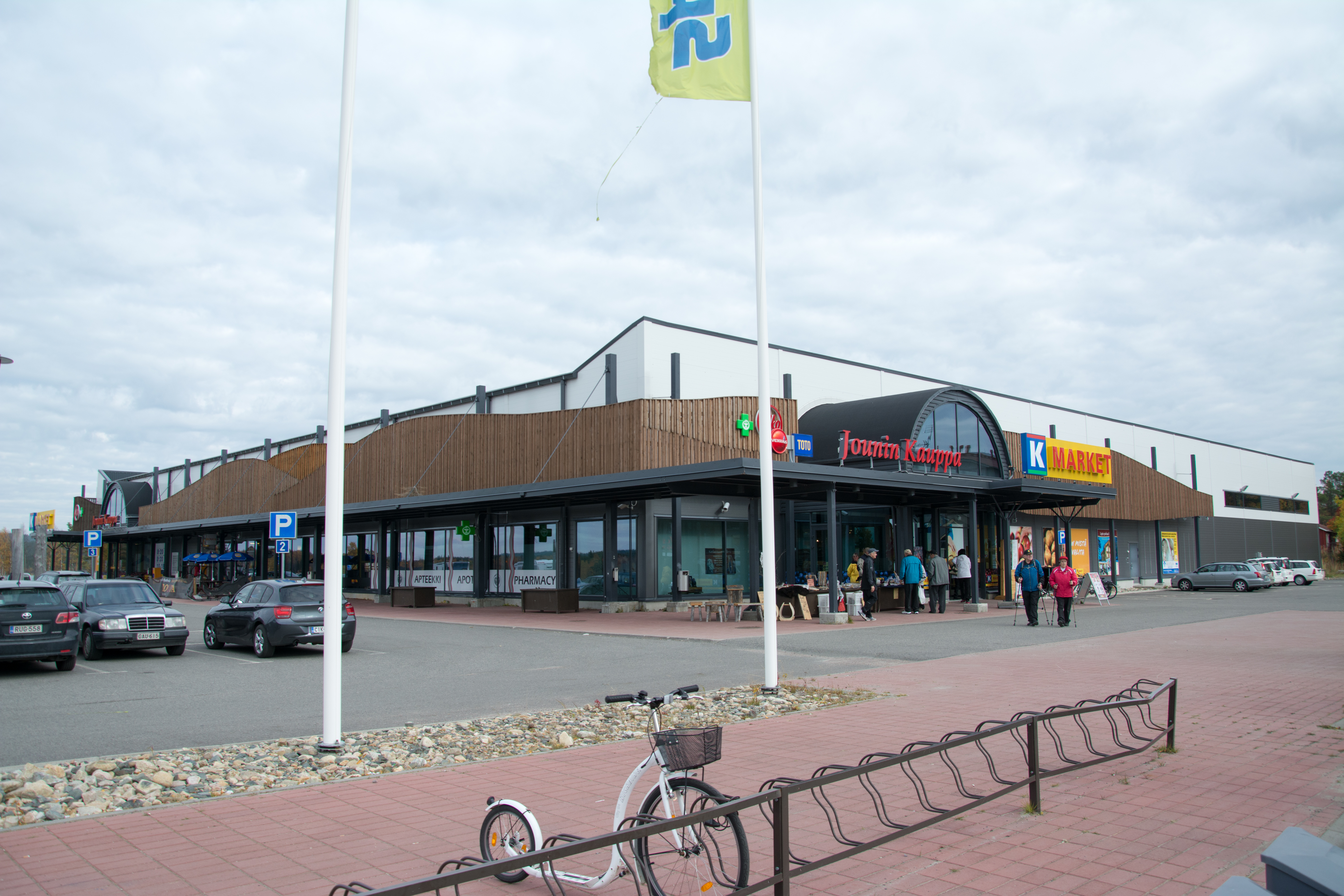 Jounin kauppa Kolarissa